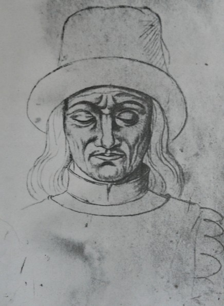 Jan Lucemburský